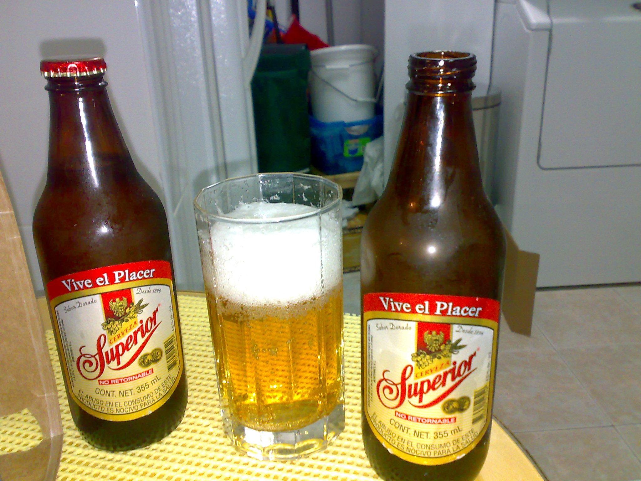 Det meksikanske ølmerket Superior. Bildet er tatt i Mexico by.